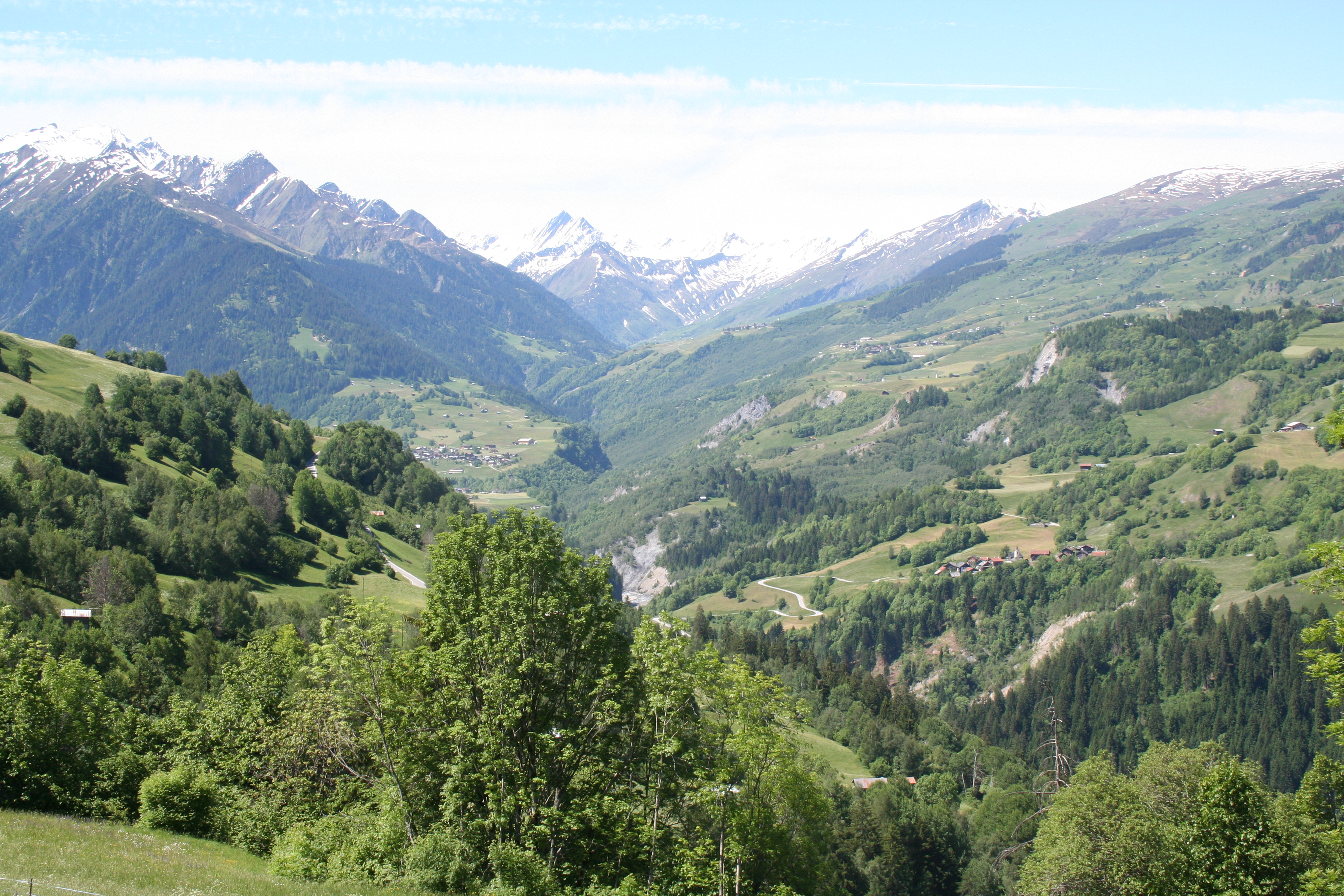 Blick ins Val Lumnezia. rechts das Dorf Peiden